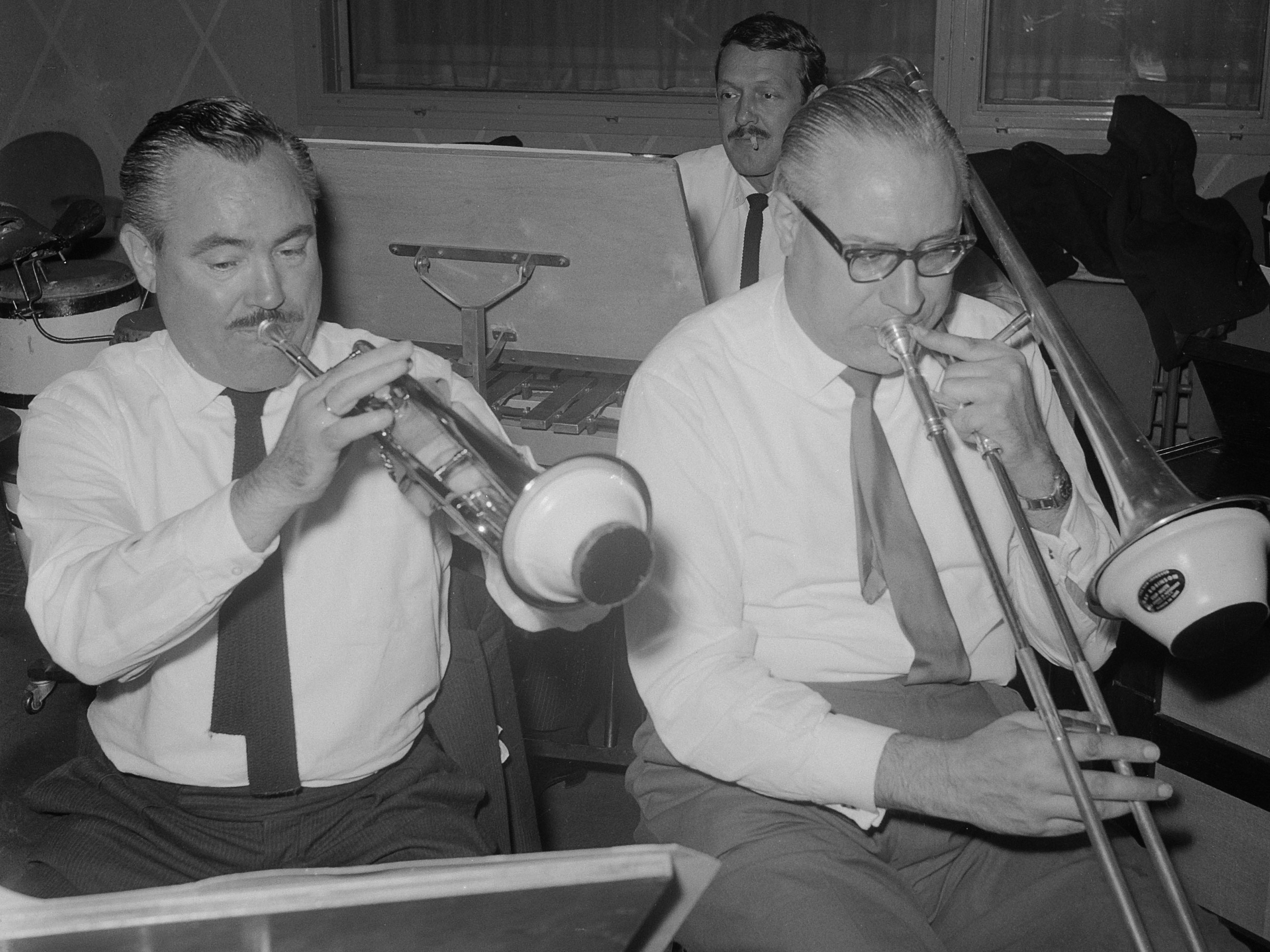 Oefening van de kapel der kapelmeesters onder leiding van G. Nieuwland , links Willy Schobben en rechts Pi Scheffer 19 oktober 1959